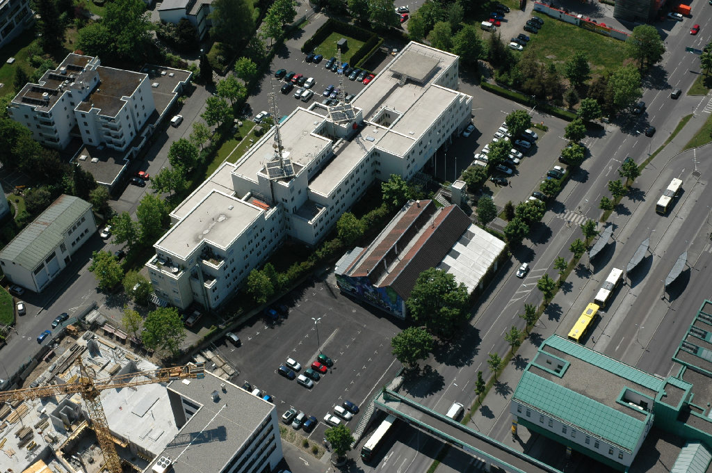 Landespolizeidirektion (LPD) Vorarlberg in Bregenz (Bis 1. September 2012: Landespolizeikommando (LPK) und Sicherheitsdirektion (SID) für Vorarlberg). Unter anderem Sitz des Landeskriminalamts (LKA), der Landesverkehrsabteilung (LVA) und des Landesamts für Verfassungsschutz und Terrorismusbekämpfung (LVT).